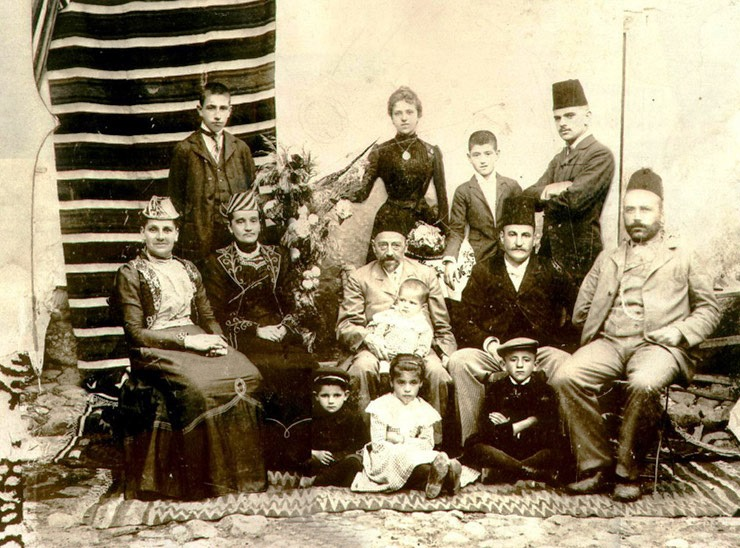 משפחה יהודית ספרדית כפי שצולמה בסרייבו בשלהי המאה ה-19